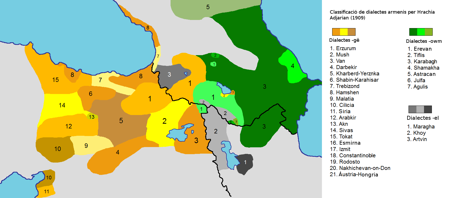 Imatge de fitxers armenis descarregat de la Viquipèdia en anglès